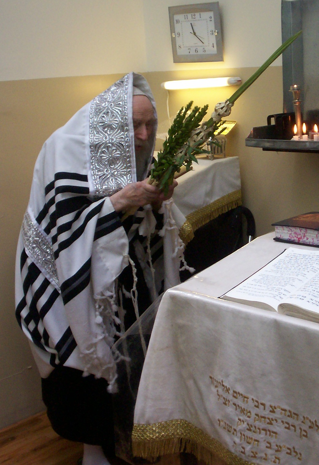 עם עטרה נוספת באמצע הטלית